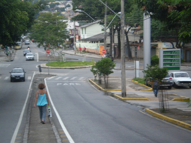 Rotatória da avenida Elísio de Brito com a avenida Itaituba, na divisa entre os bairros Boa Vista e São Geraldo, Belo Horizonte, Minas Gerais, Brasil.